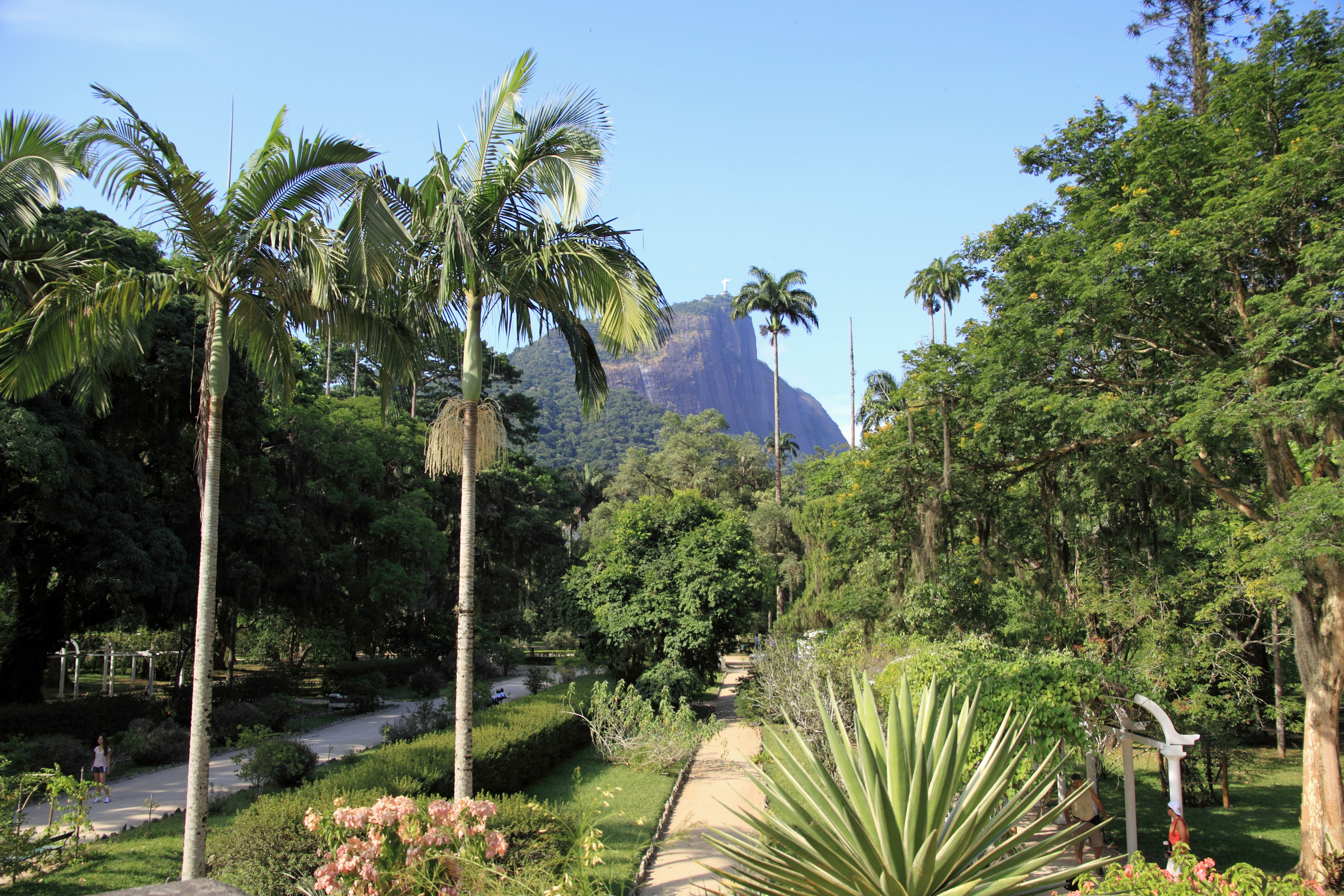 Corcovado com o Cristo Redentor visto do Jardim Botânico do Rio de Janeiro.